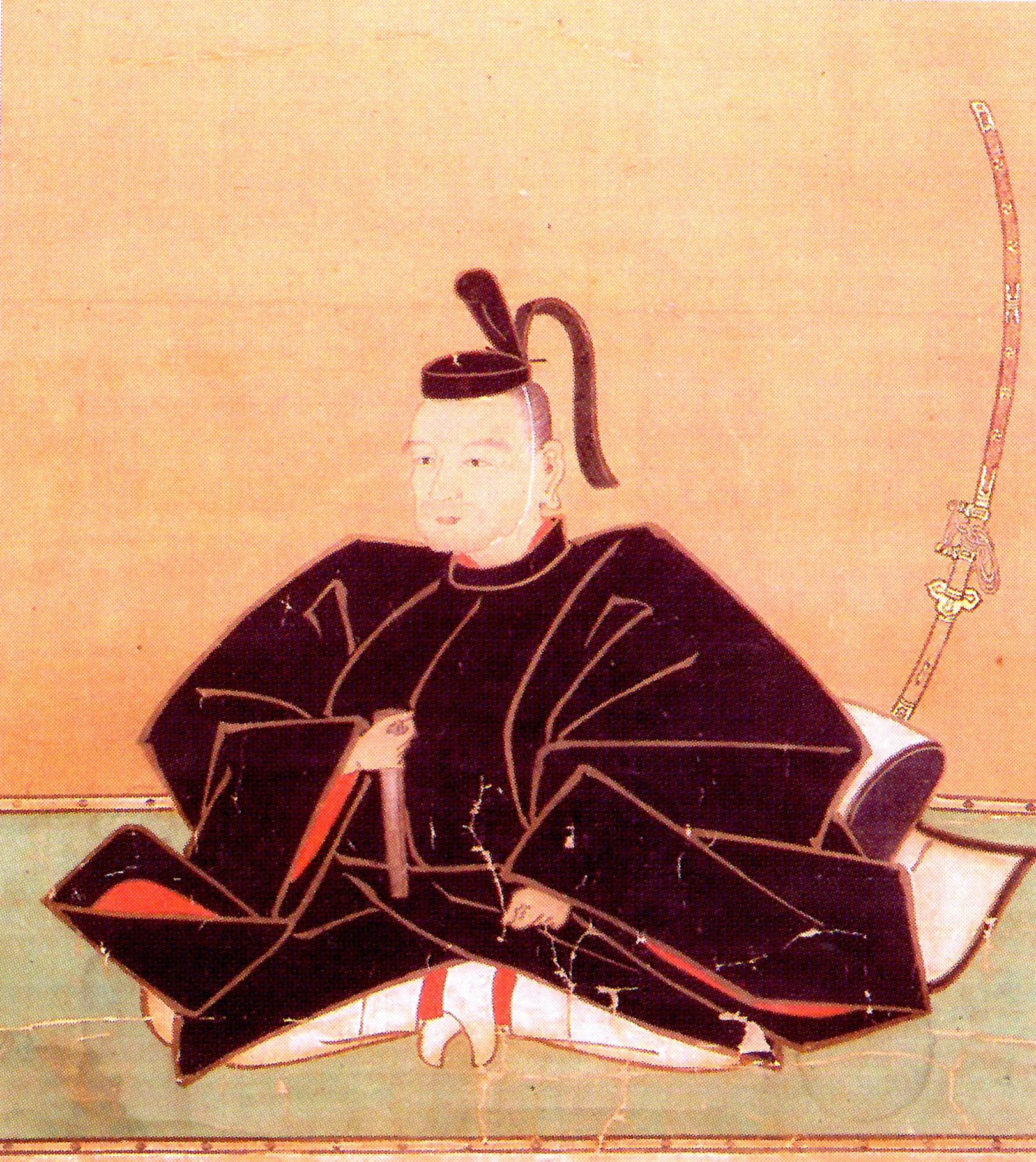 岡部行隆の肖像。